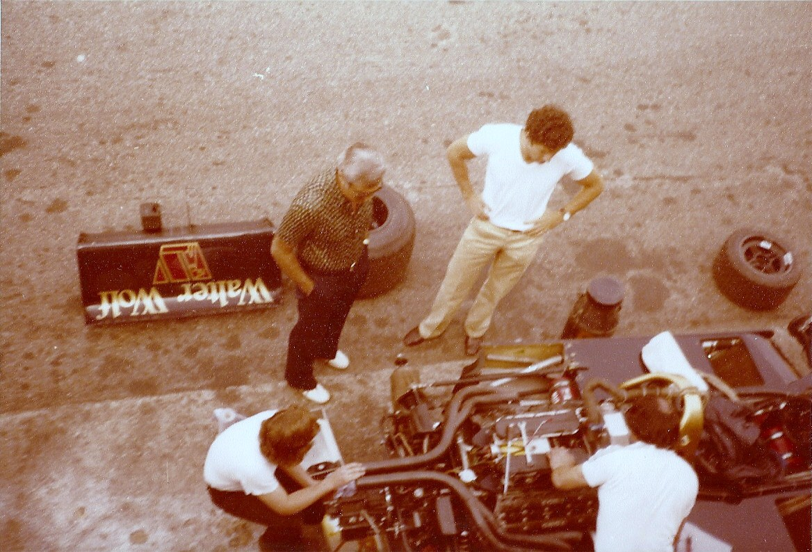 Jody